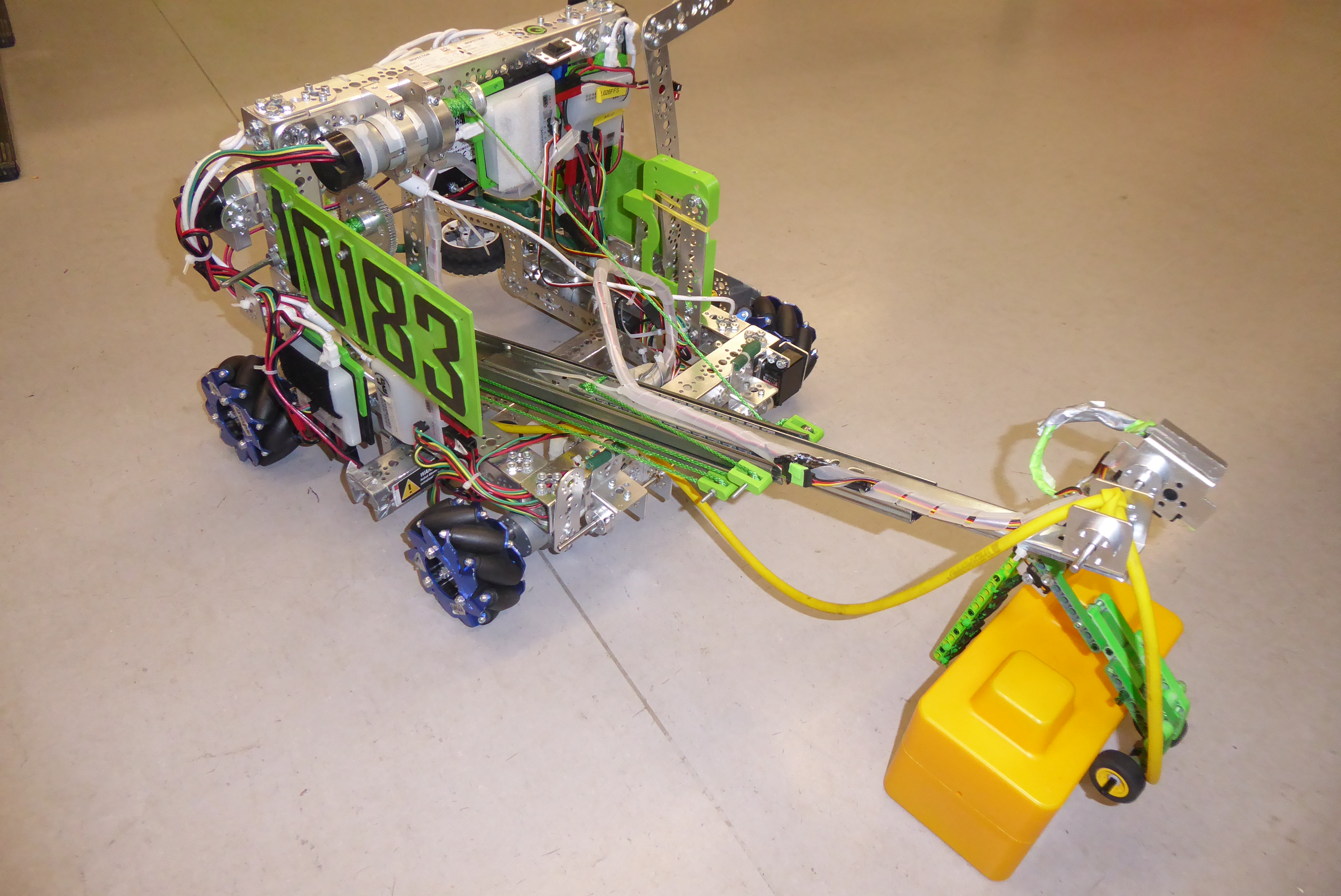 Foto eines Roboters der FIRST Tech Challenge